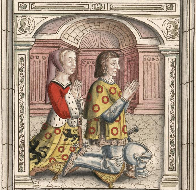 Vitre dans l'église de Ste Foy, elle représente Florent d'Illiers, chevalier baron du chesne doré, bailly et capitaine de Chartres